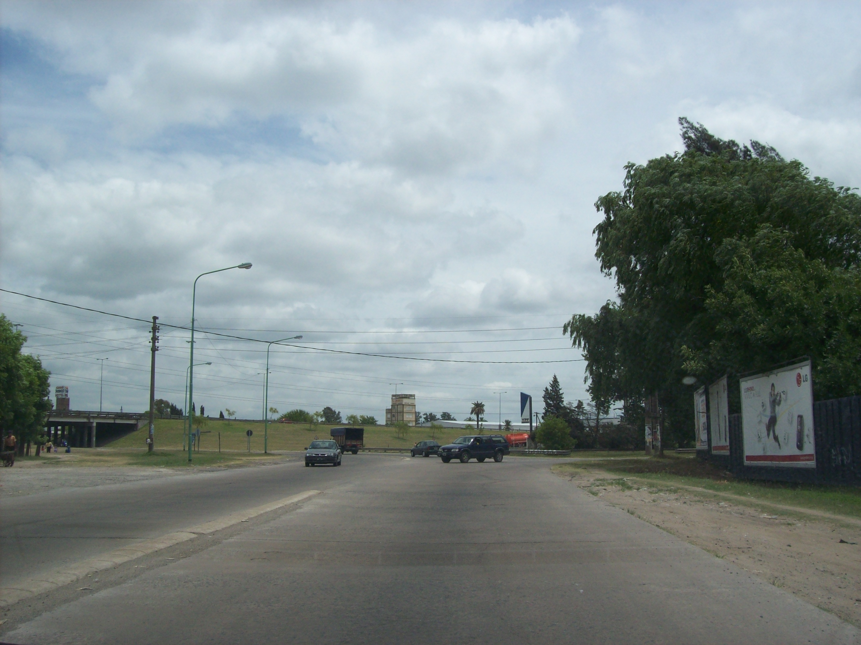 Intersección de la Avenida Constituyentes (Ruta Provincial 9) y el Acceso Norte (Ruta Nacional 9) en Benavídez, Partido de Tigre, Provincia de Buenos Aires, Argentina.